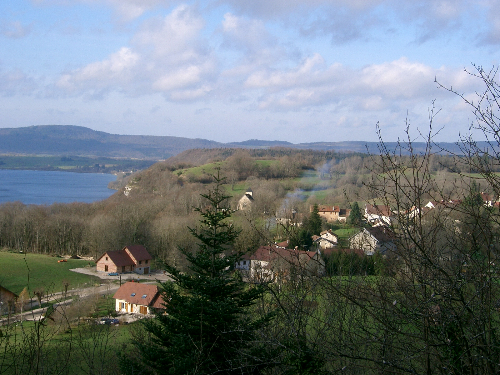 Fontenu (39) : village en novembre 2006 self made PRA